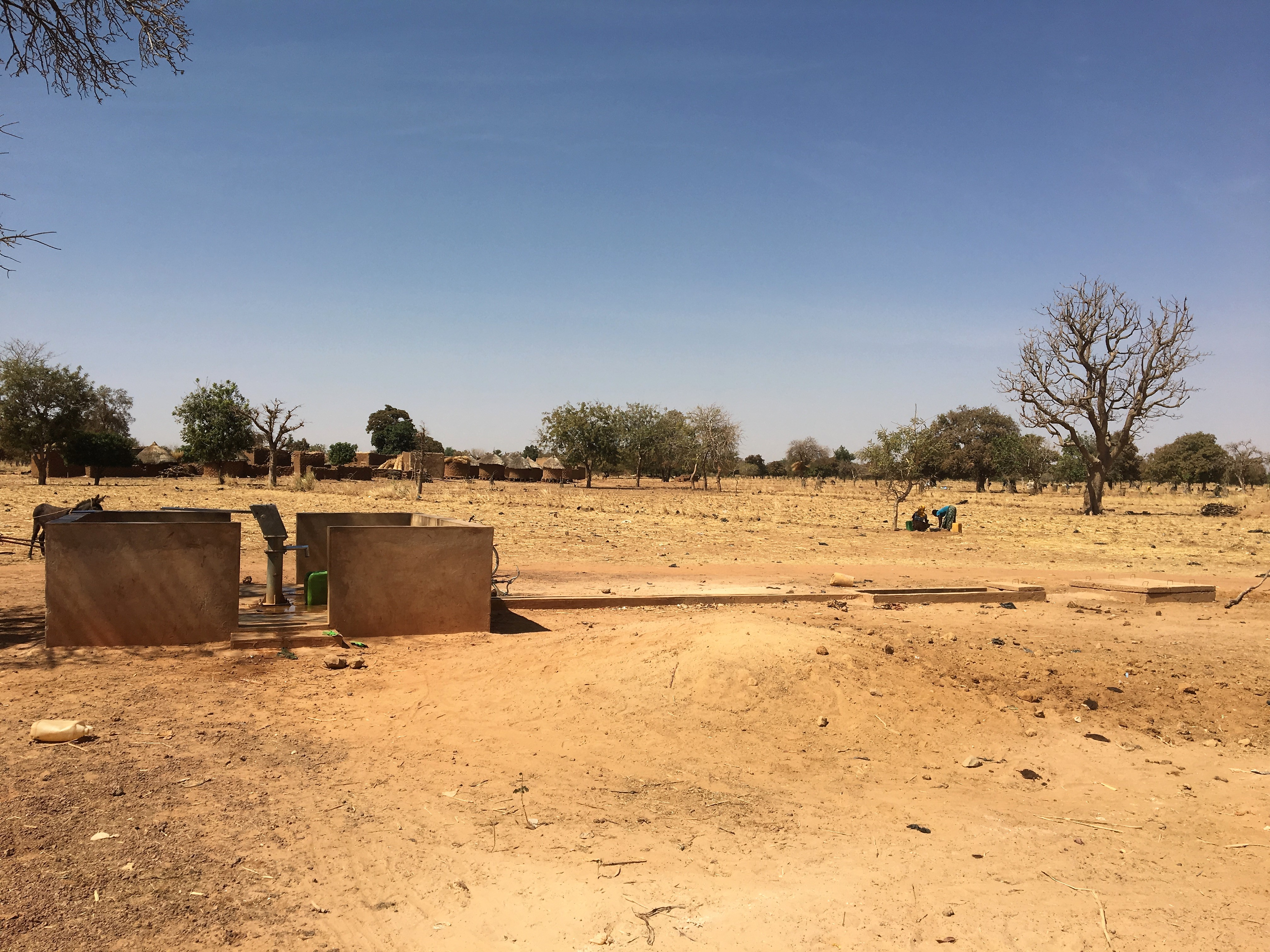 Forage de Rambo-Watinooma